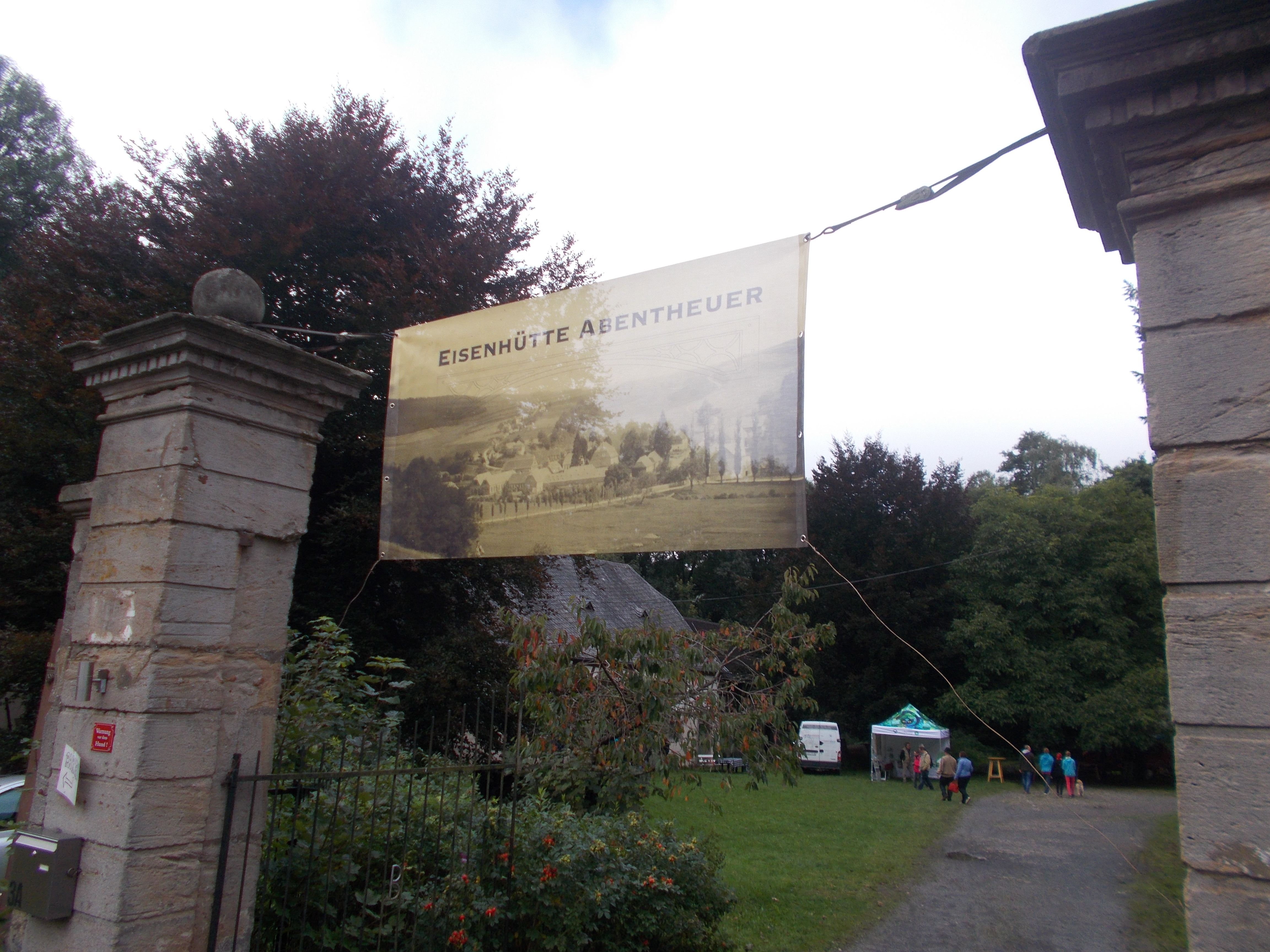 von Bruchsteinmauer umgebenes Gelände und Baulichkeiten der früheren Erzhütte Nr. 1: ehemaliges Kleinwarenlager (1771) Nr. 3: Herrenhaus; Mansarddachbau, Seitenrisalite (drittes Drittel des 18. Jahrhunderts) Nr. 3a: Verwaltungs- und Gästehaus; Stall- und Remisengebäude (ab 1772) Nr. 5: Wohn- und Produktionsbau Reste des eisernen oberschlächtigen Wasserrads (zweite Hälfte des 19. Jahrhunderts) gusseiserne Brücke (um 1800) Reste des Hochofens (Anfang des 19. Jahrhunderts) Lauf des Traunbachs, Weiher, Landschaftsgarten